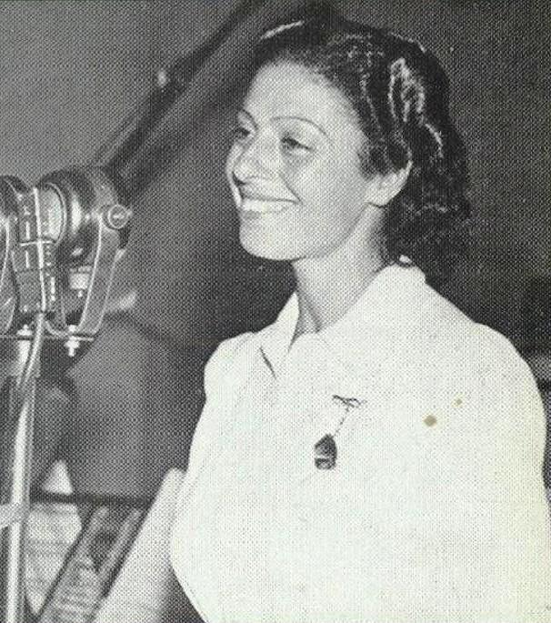 Luciana Dolliver (1910 - 1982) est une chanteuse italienne